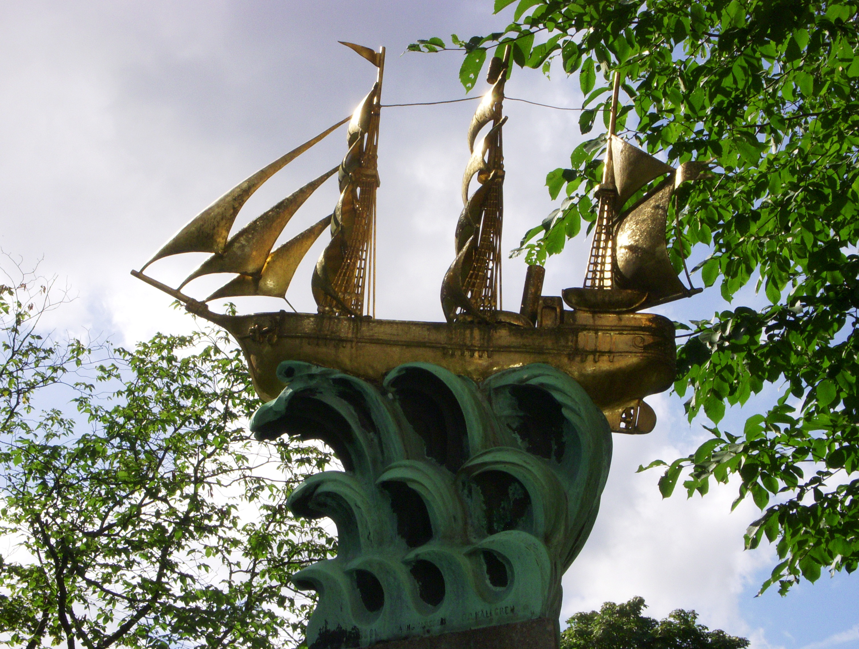 Vegamonumentet vid Stockholms gamla observatoriet av Ivar Johnsson